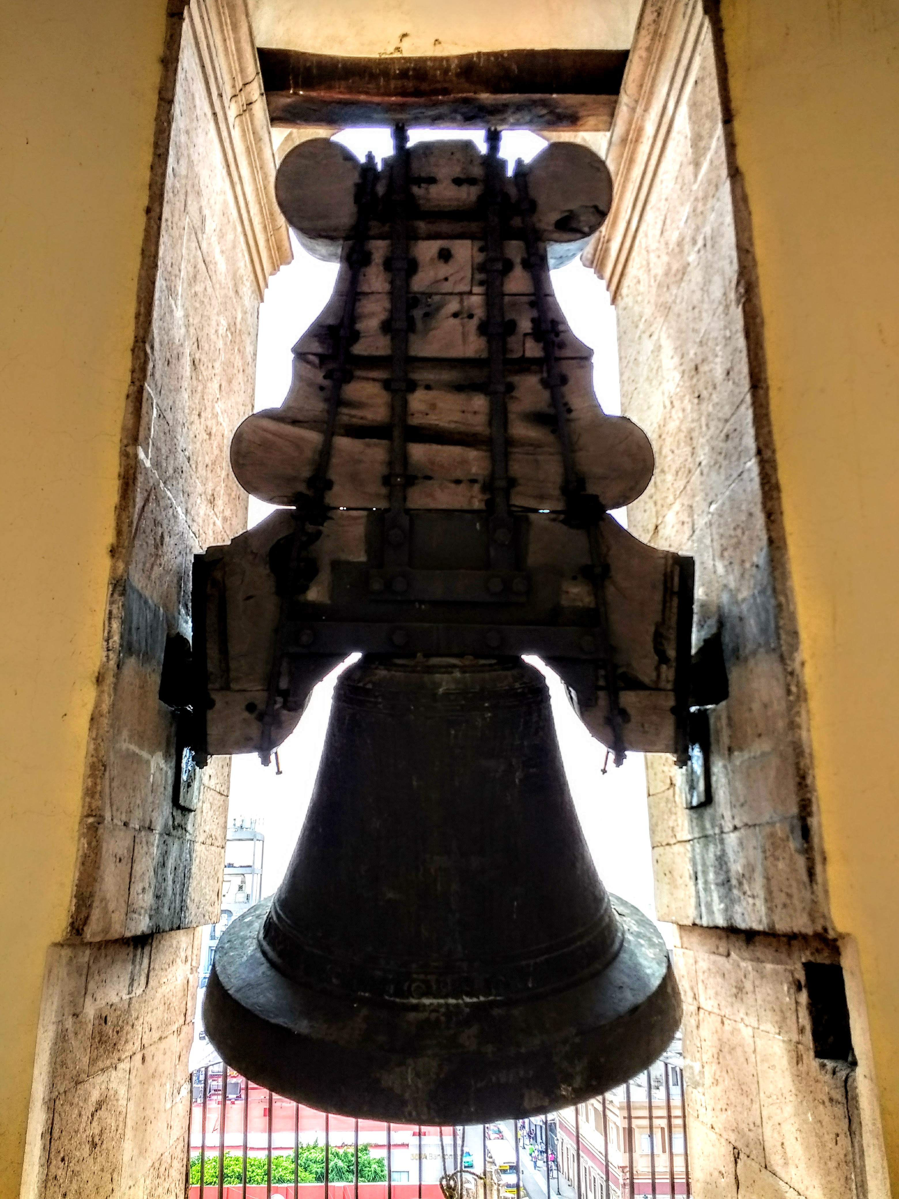 Esquila